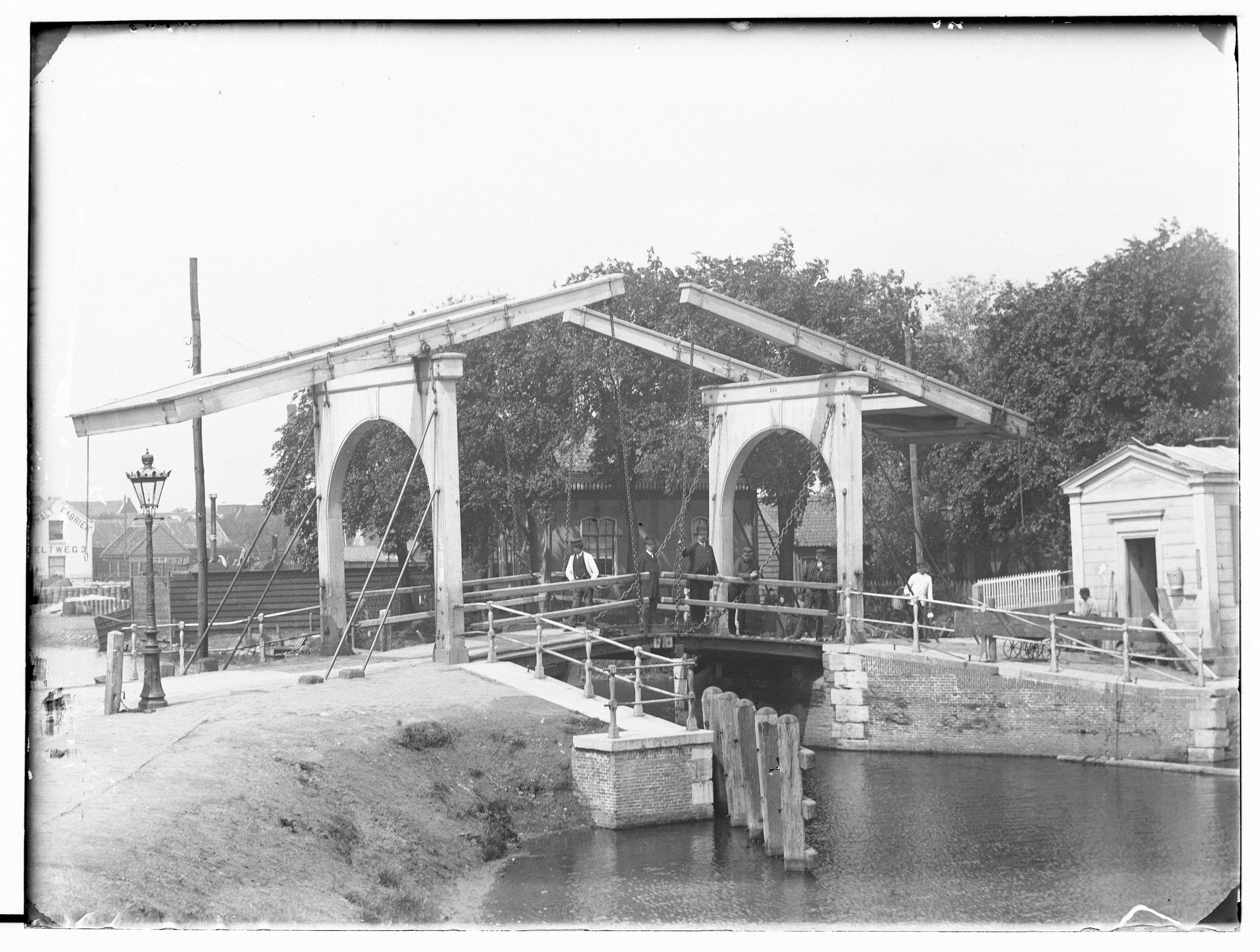 Beschrijving Kattensloot Kattenbrug nr.155. Links: Nassaukade``, rechts: Tweede Nassaustraat Documenttype foto Vervaardiger Olie``, Jacob (1834-1905) Collectie Collectie Jacob Olie Jbz. Datering 1890 Geografische naam Kattensloot Inventarissen Afbeeldingsbestand 010019000157 Generated with Dememorixer